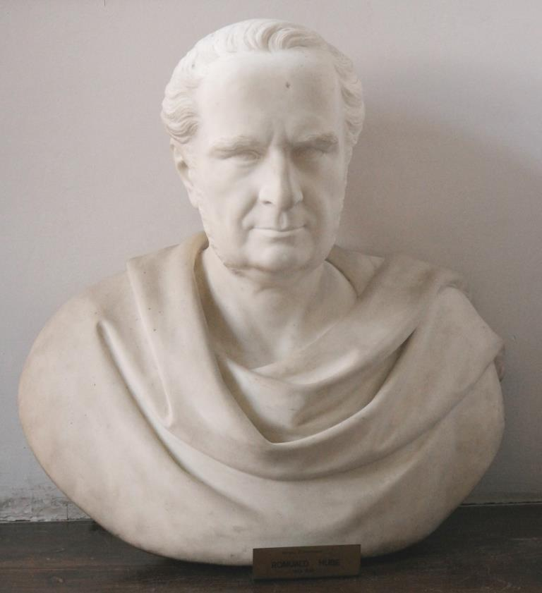 Büste des Rechtsgelehrten Romuald Hube (1803-1890) im Collegium Maius in Breslau